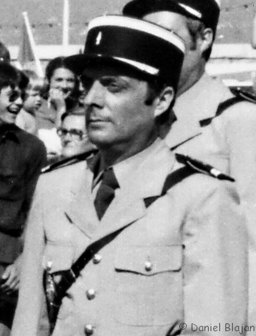 L'acteur Michel Modo lors du tournage Le Gendarme et les Extra-terrestres en 1978, à Saint Tropez.